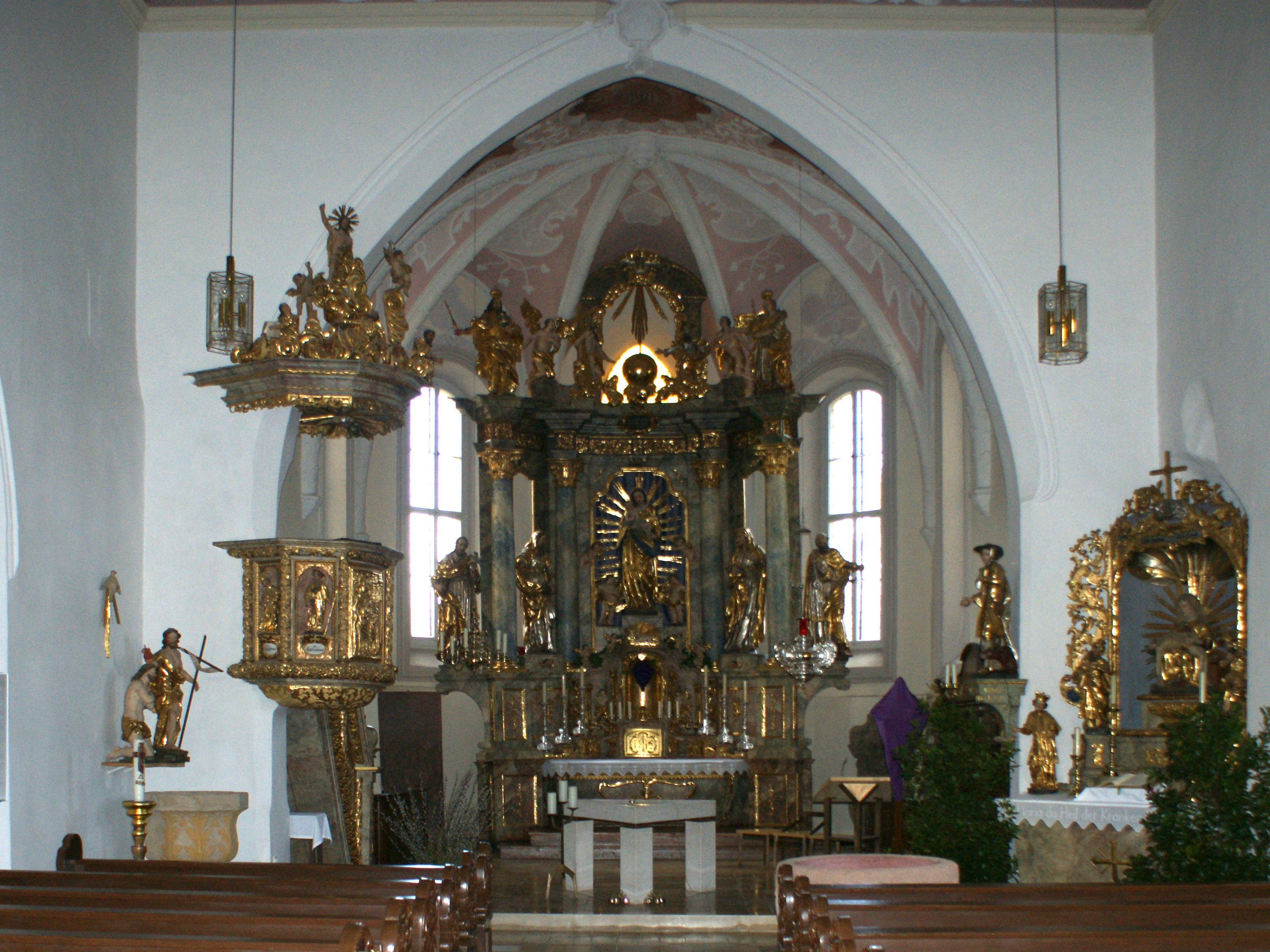 Barockkirche "Maria Heimsuchung" in Bühl Simmelsdorf: Altar